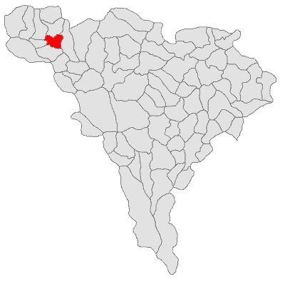 Categorie:Hărţi ale judeţului Alba